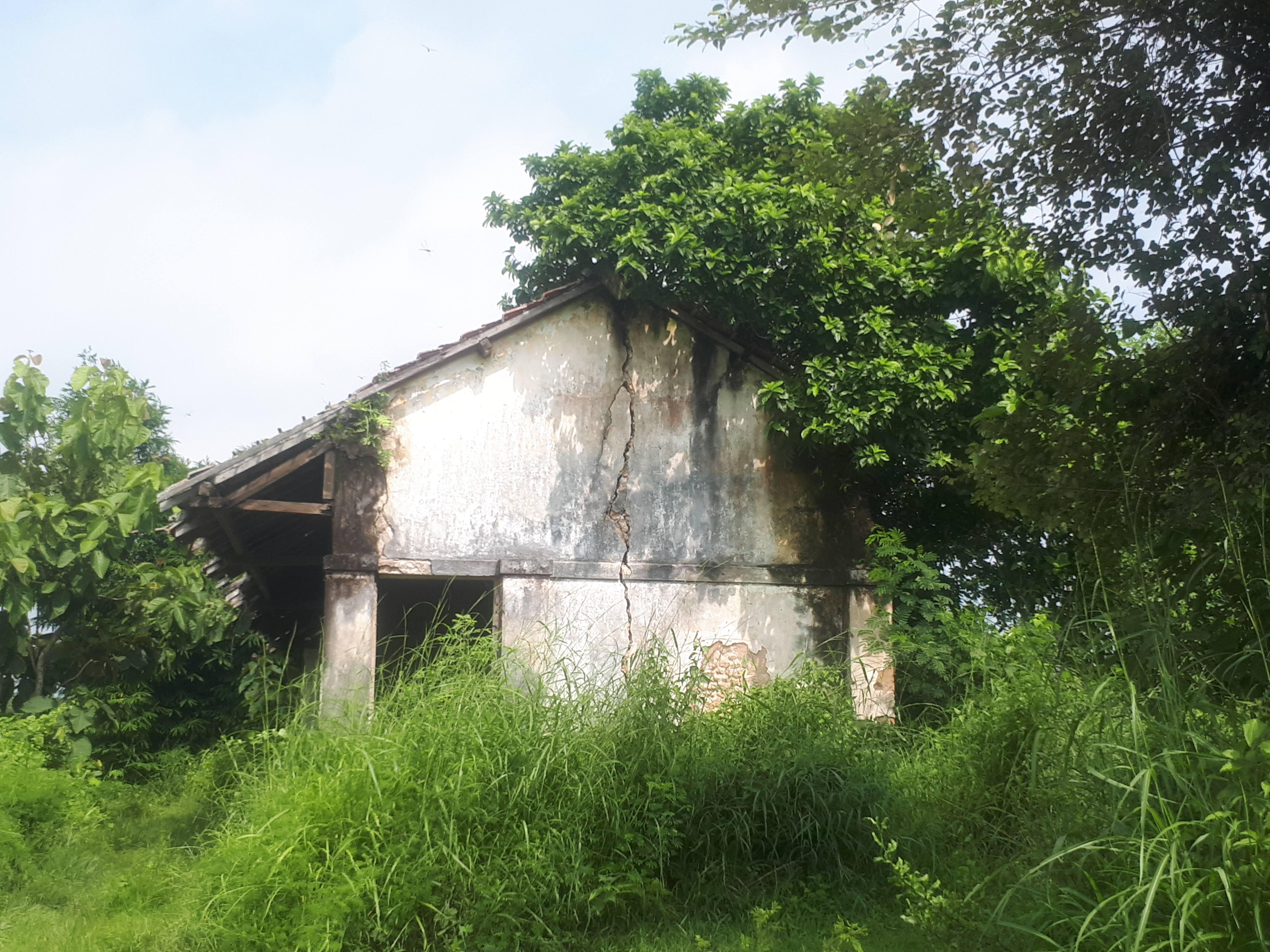 Stasiun Labang merupakan salah satu stasiun non-aktif di Kabupaten Bangkalan. Stasiun yang terletak di Jukong, Labang, Bangkalan ini diresmikan oleh Rikuyu Sokyuku